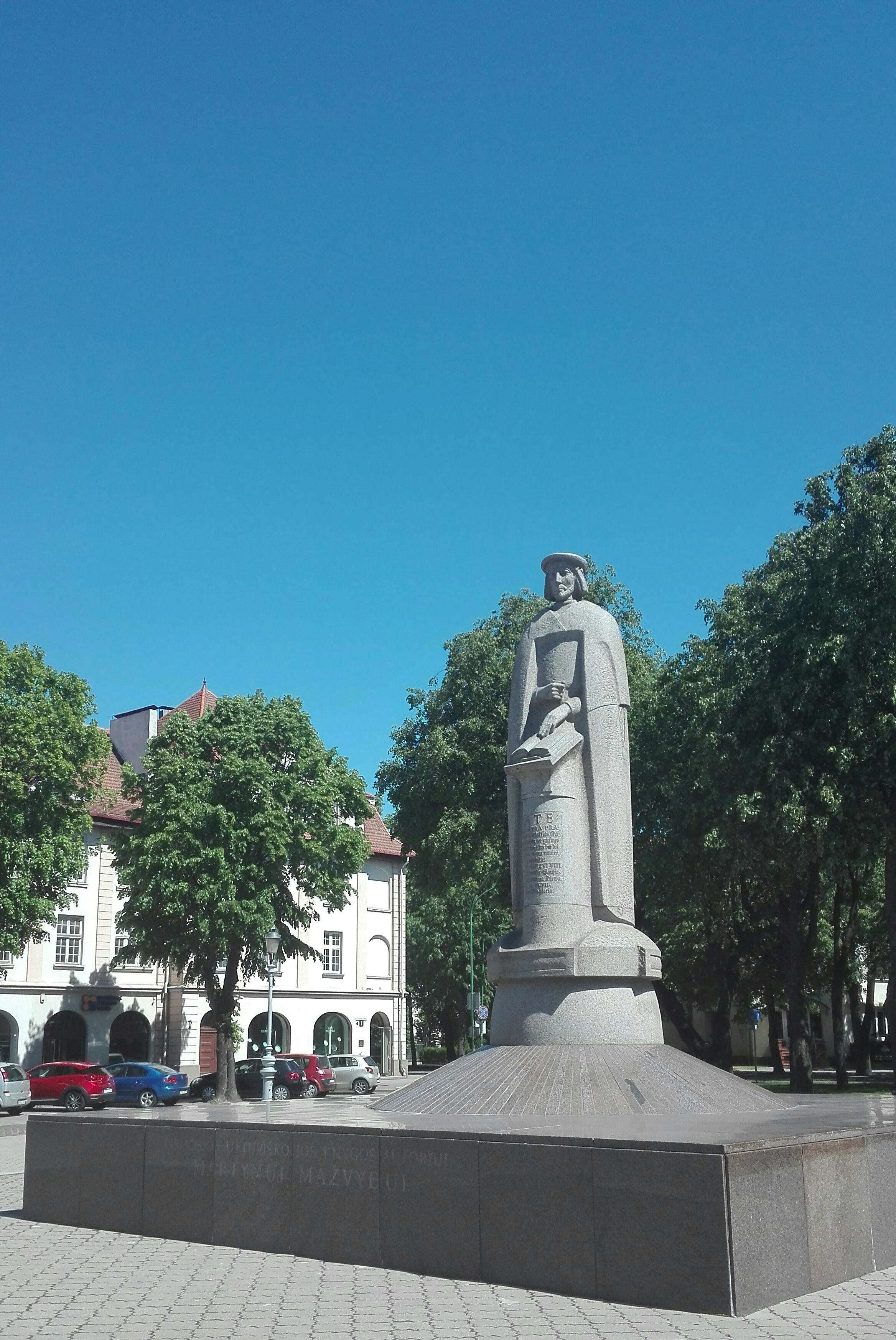 Lietuvininkų aikštės skulptūra, Klaipėda